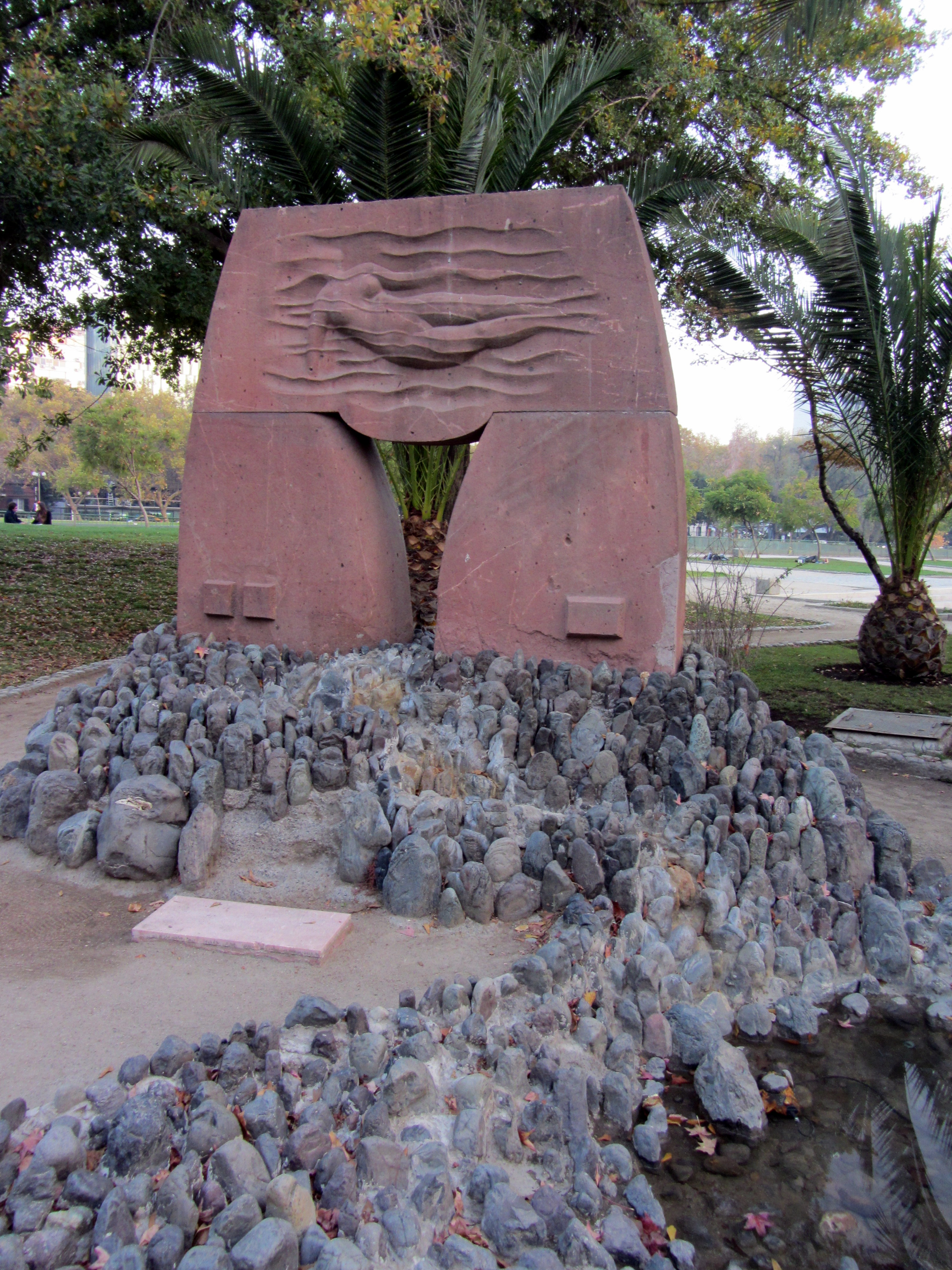 Puerta del agua; Parque de las Esculturas de Providencia